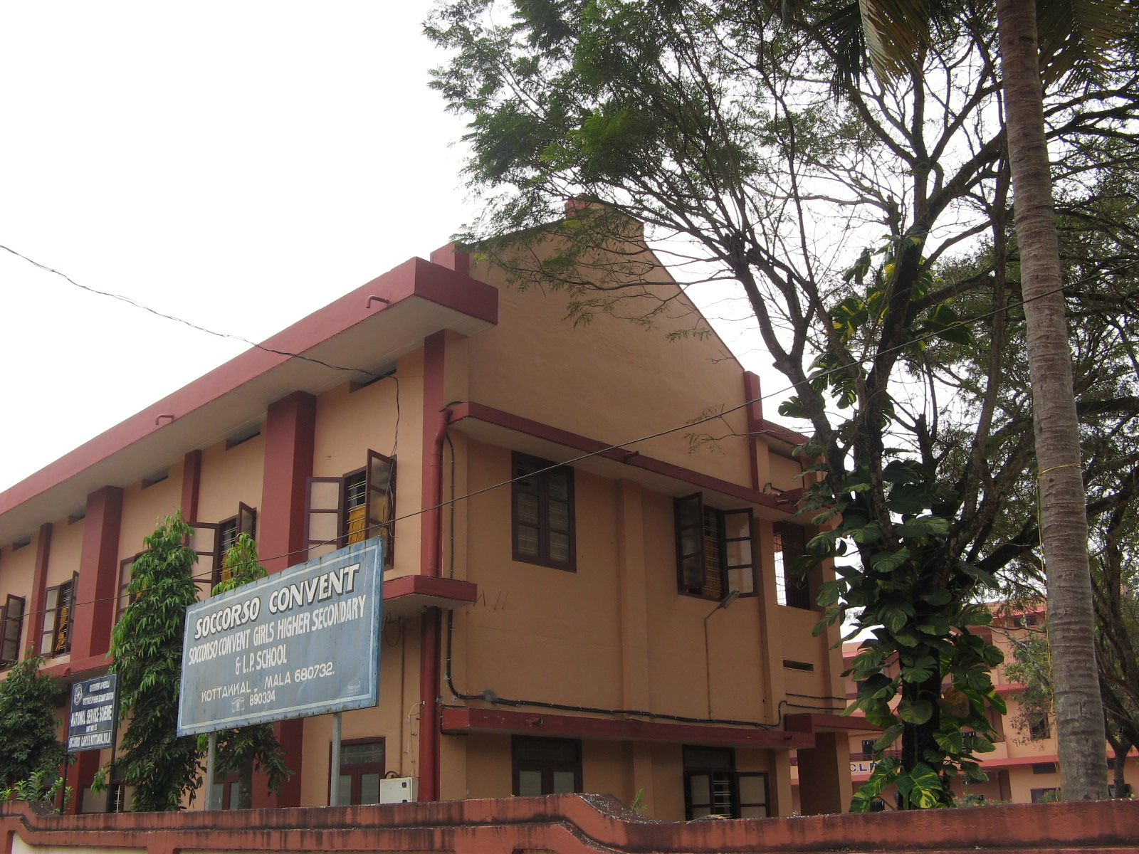 മാള സൊക്കോർസോ സ്കൂൾ